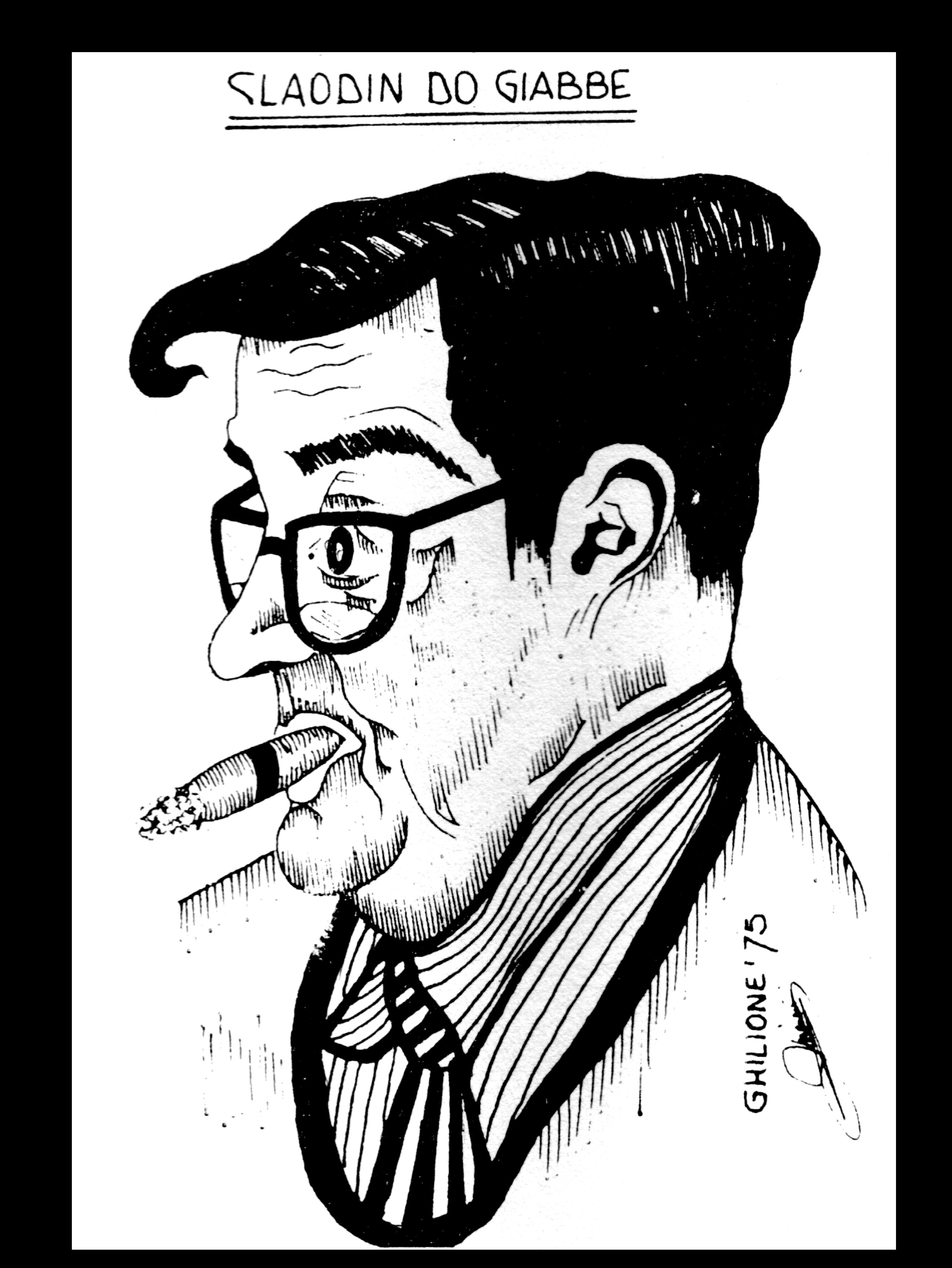 Scaglia Mario (Claodin Do Giabbe) in una caricatura di Gianni Ghilione (GhiGi) del 1975